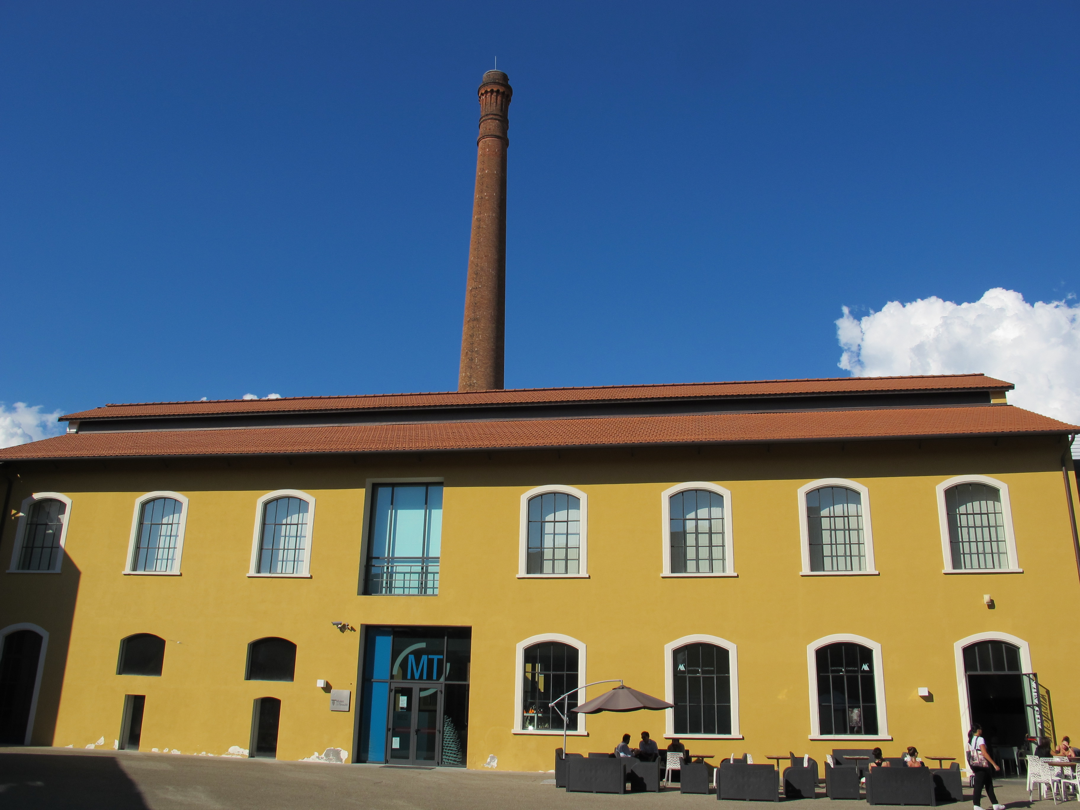 Biblioteca Lazzerini (ex fabbrica Campolmi) This is a photo of a monument which is part of cultural heritage of Italy.